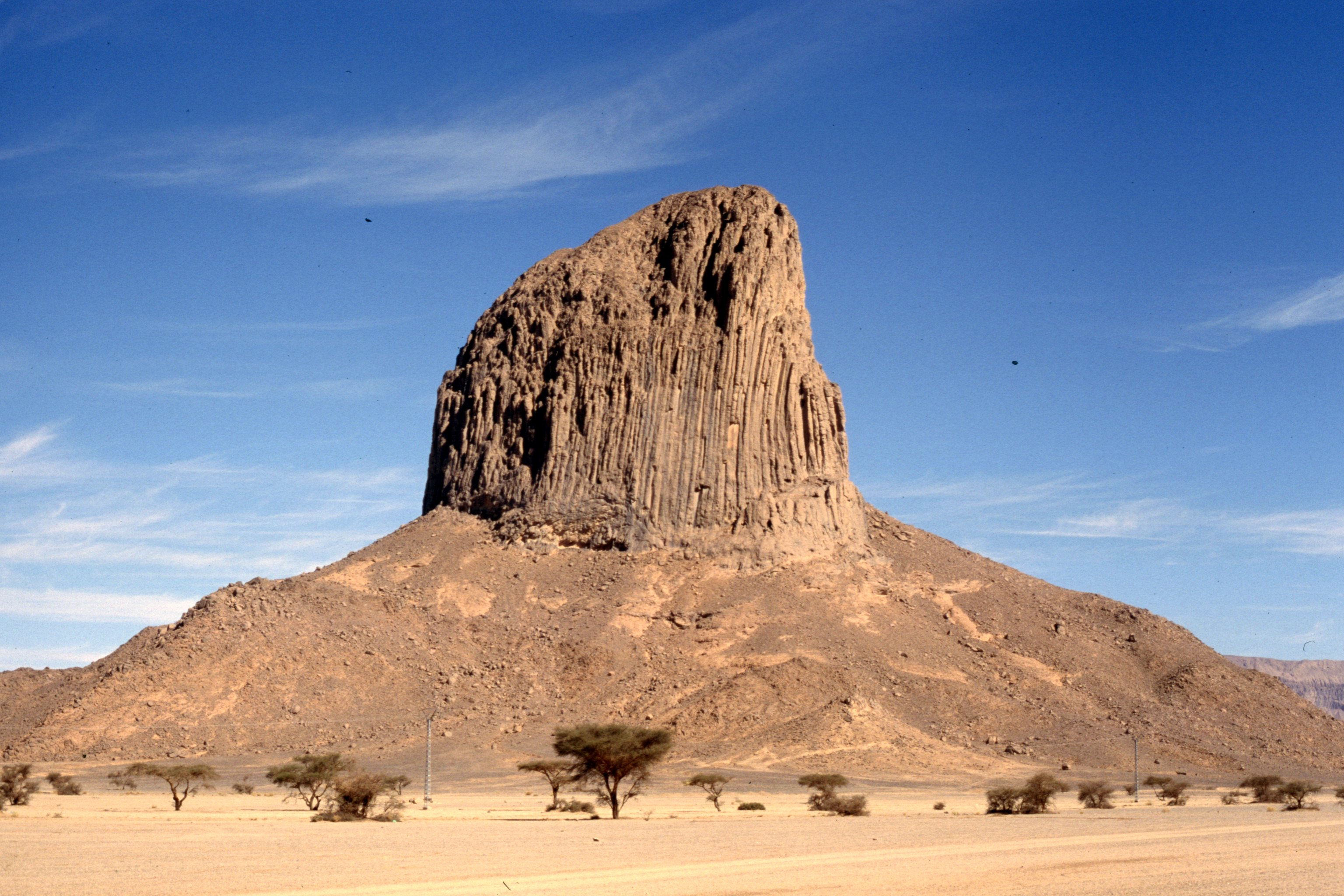 Région de l'Asskrem dans le Hoggar (wilaya de Tamanrasset, sud de l'Algérie).